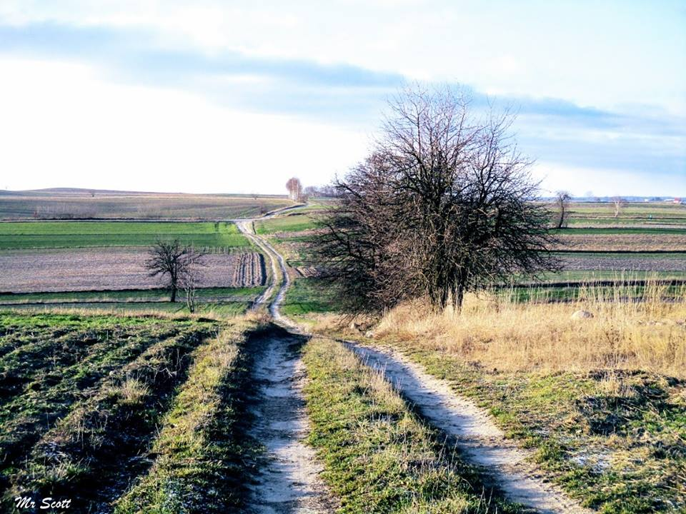 Blick aus Norden in Richtung Kochanów: Links Felder bei Kochanów, rechts Häuser von Białynin